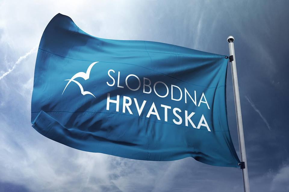 Zastava Slobodne Hrvatske